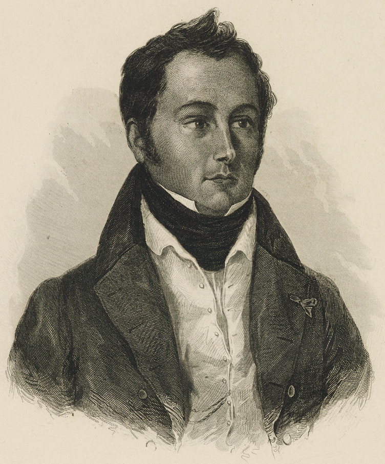 Edouard Corbière, French novelist